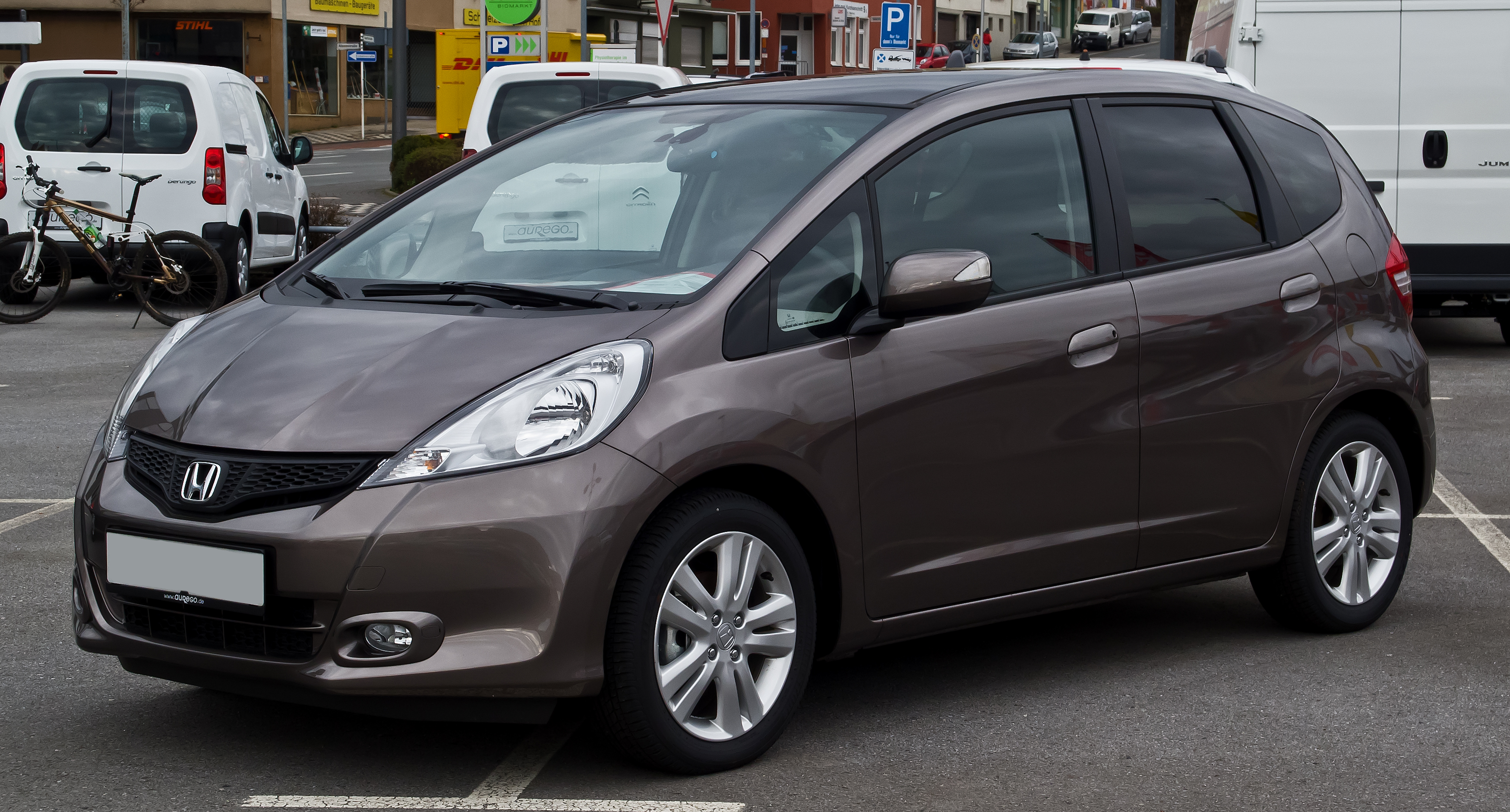 Honda Jazz 1.4 i-VTEC Elegance (III, Facelift)